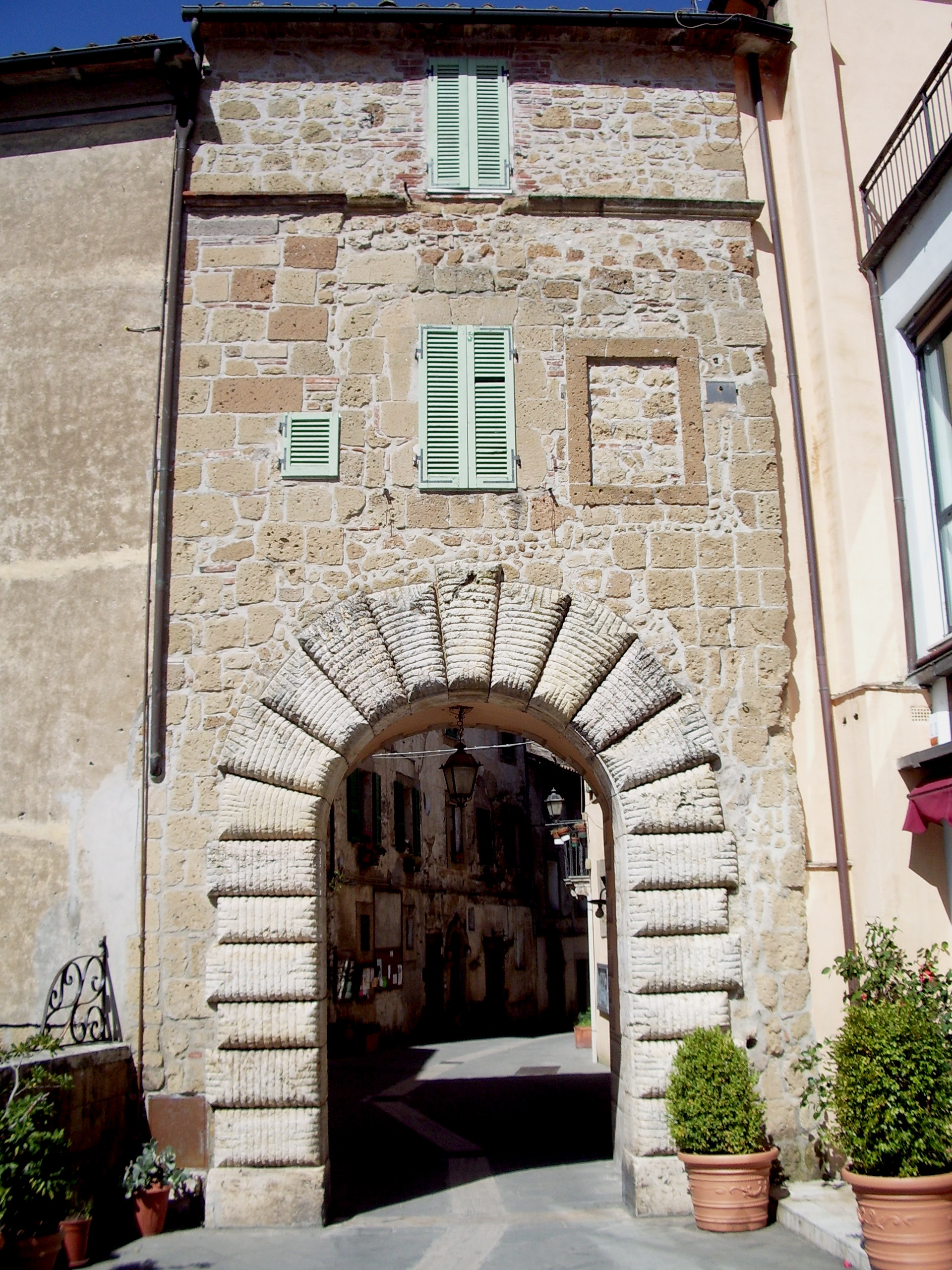 La Porta di Sopra lungo le Mura di Sorano